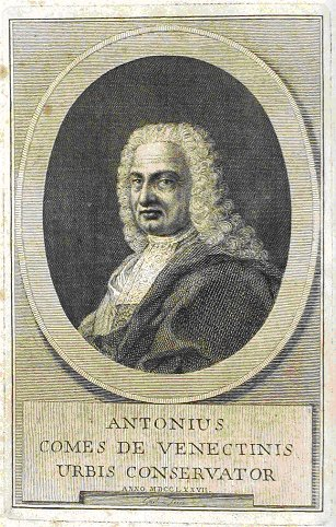 Antonio Vendettini, conte romano